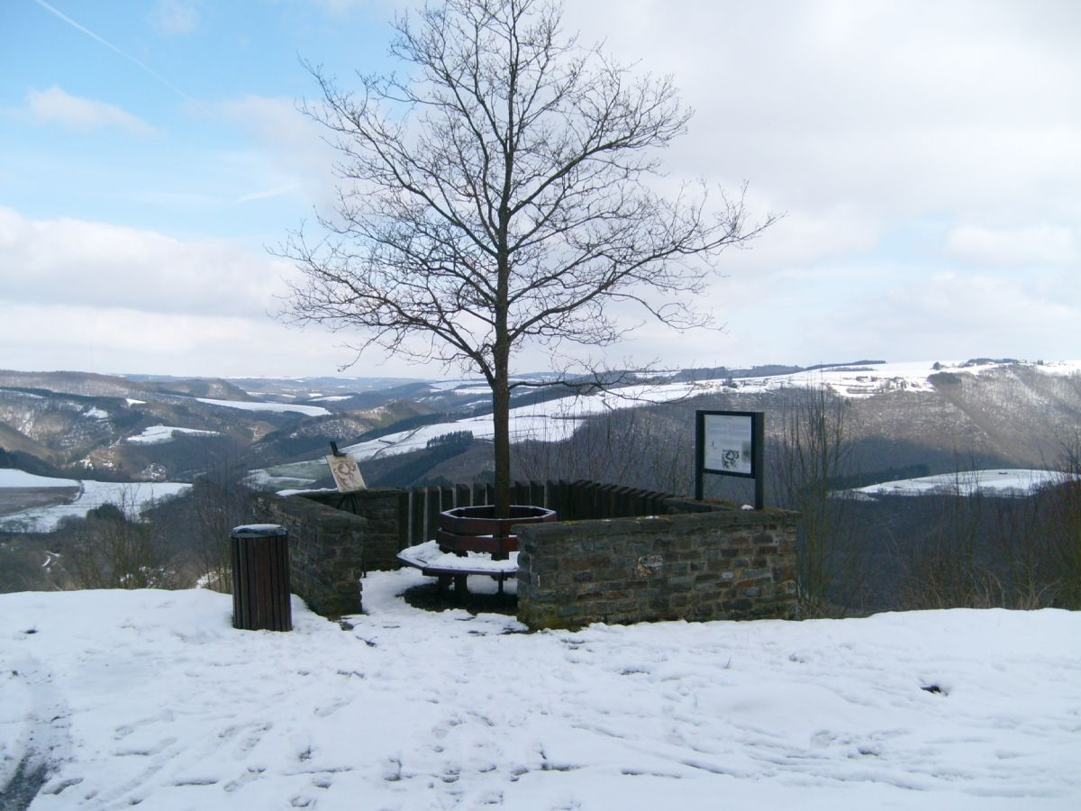 De point de vue Victor Hugo héich iwer dem Ourdall uewen u Biwels, vun wou aus den Dichter d'Ourdallschläif gemoolt huet. Datum: 23. Mäerz 2008